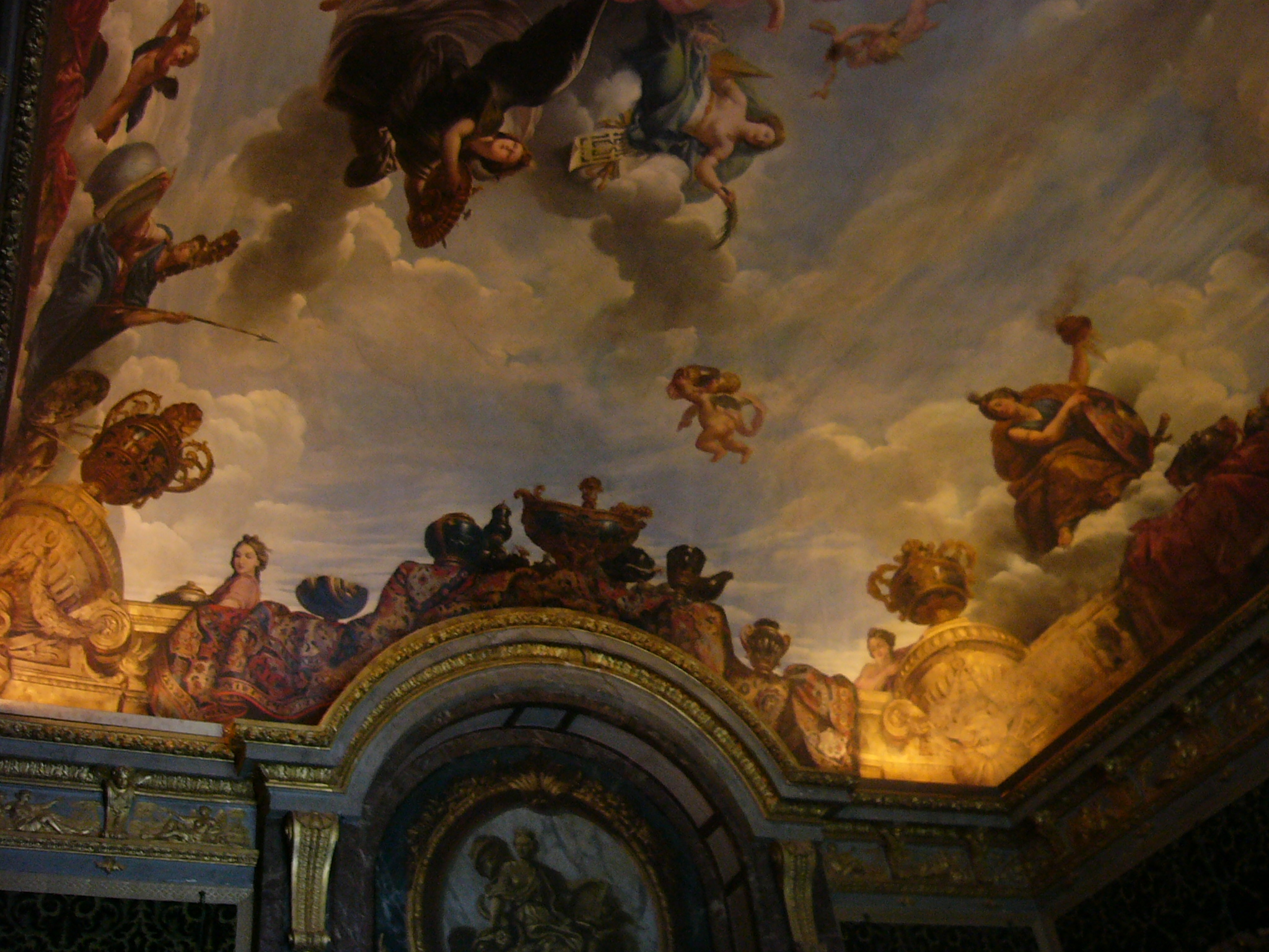 Plafond du salon de l abondance du chateau de versailles